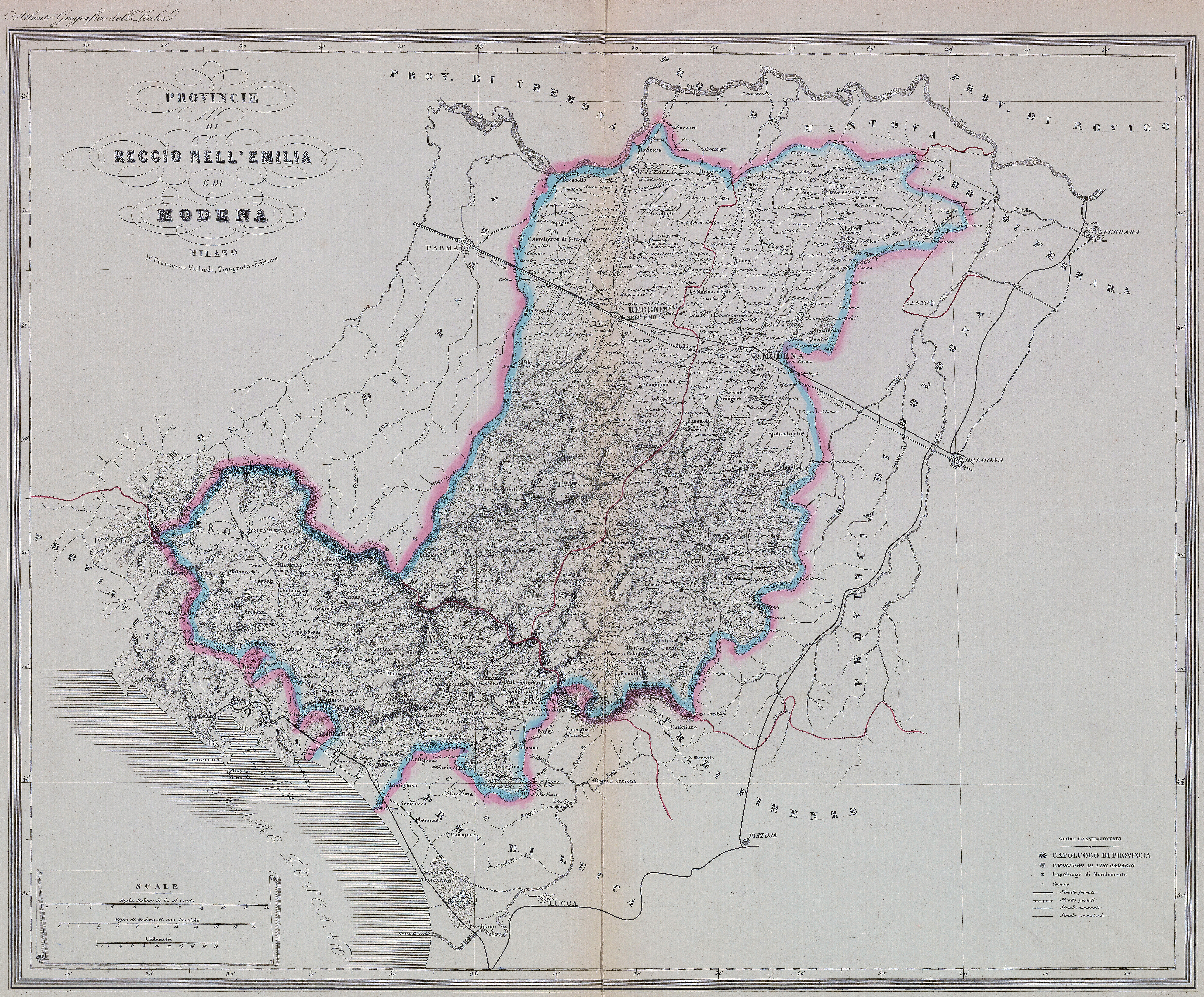 Province di Reggio nell'Emilia, Modena e Massa Carrara